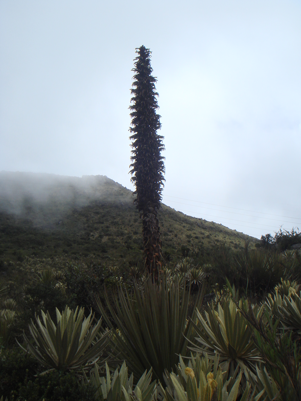 Puya (Puya goudotiana) Páramo de Guasca, Colombia